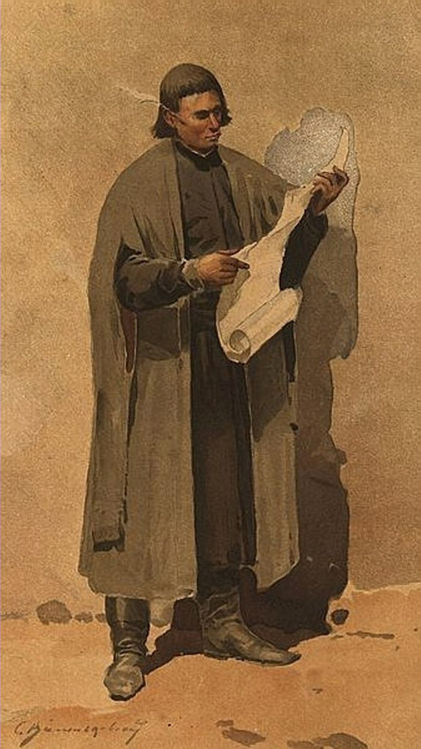 Писар військовий (по Калинському). Акварель. 1900 р. 1900 Cossack military clerk